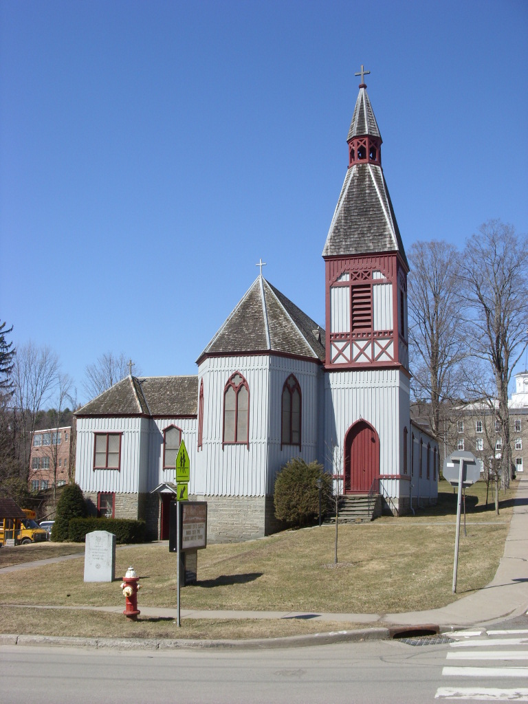 Franklin, NY